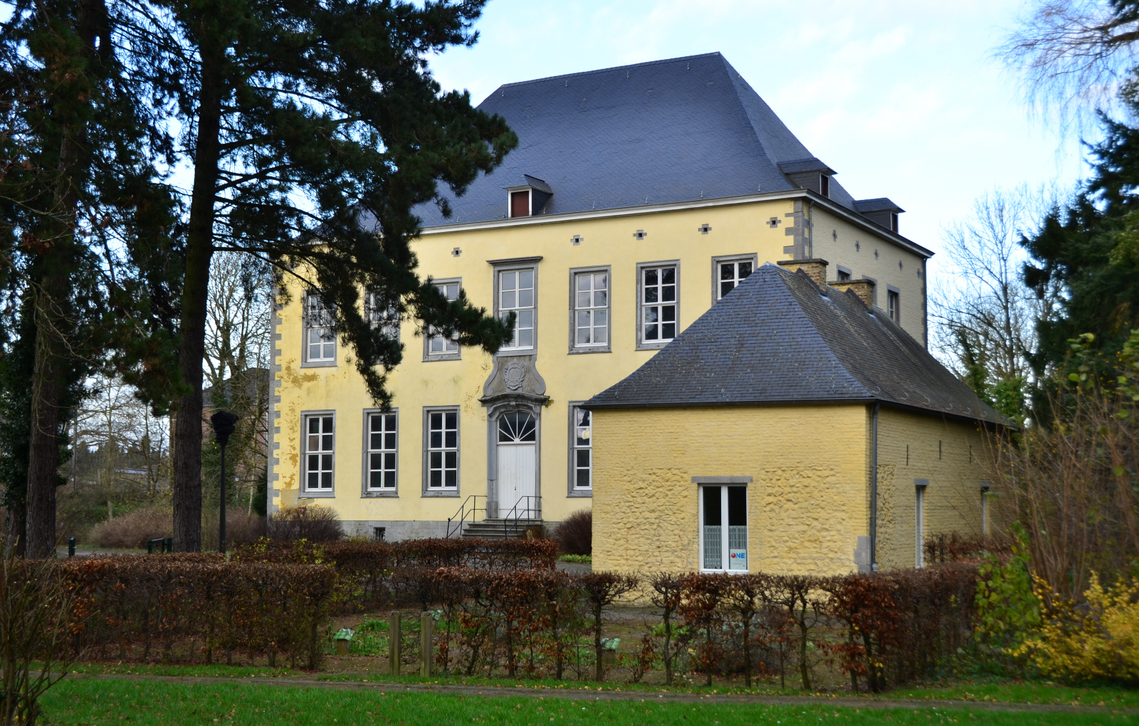 Presbytère de Pont-à-Celles